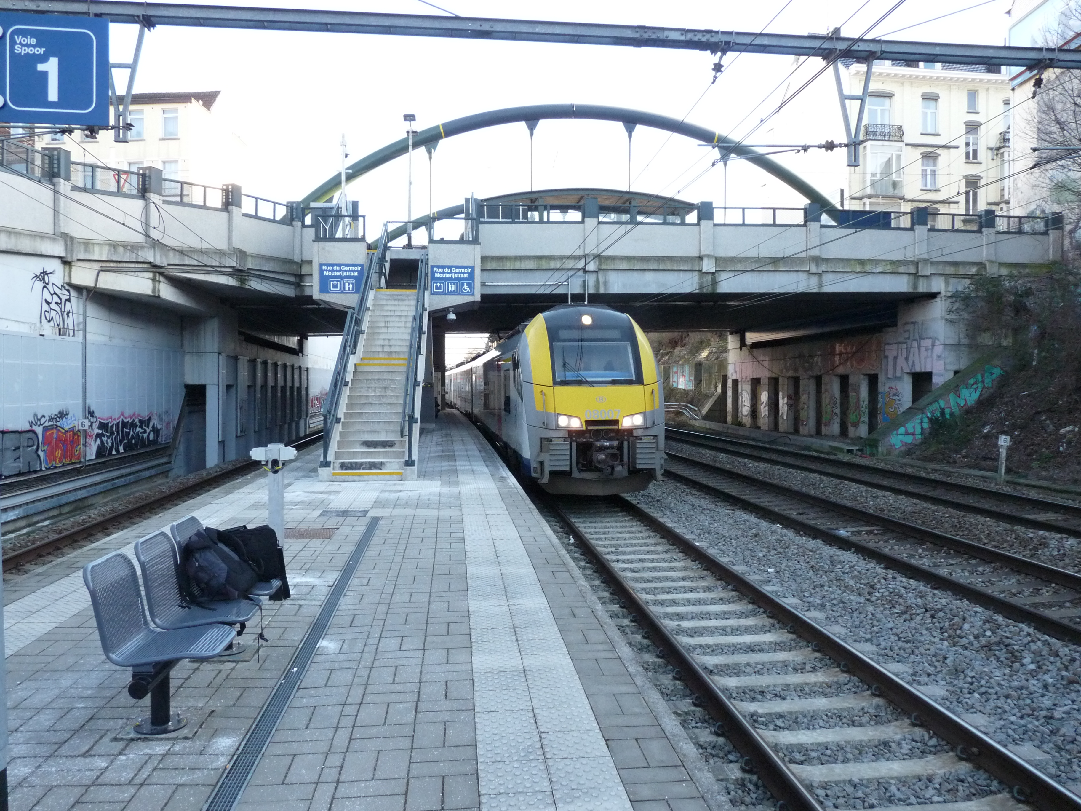 De nieuwe halte Mouterij in Brussel